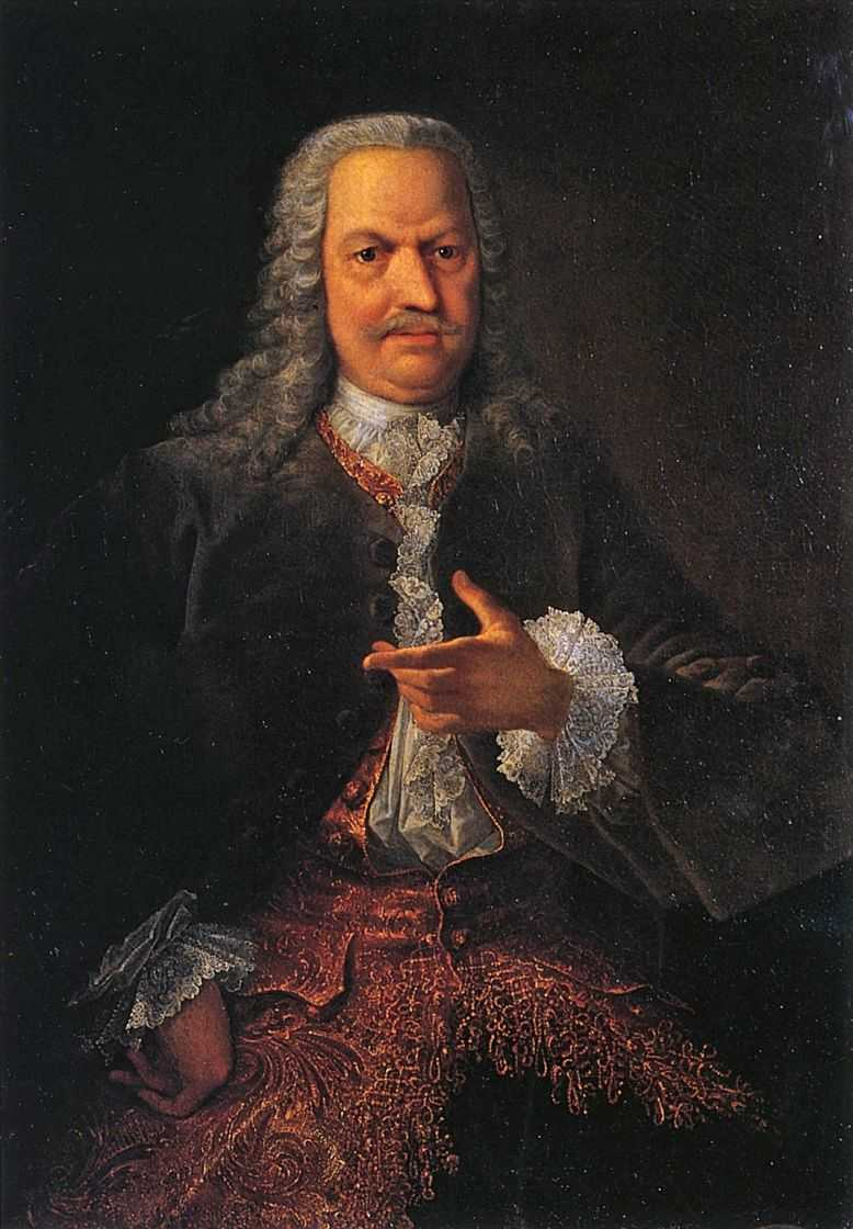 Гроот Георг Кристофор. Портрет А.Н.Демидова. 1741-1745 гг. Холст, масло. Нижнетагильский музей-заповедник